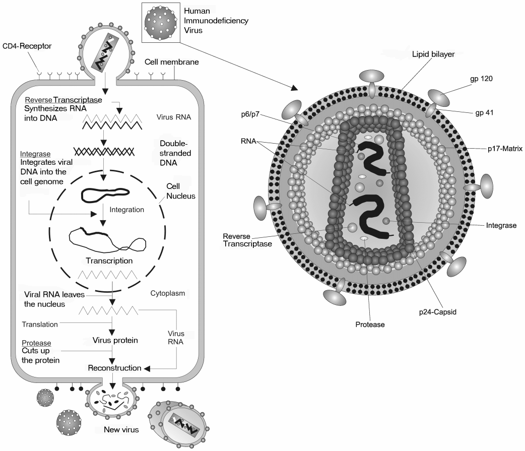 Hiv gross